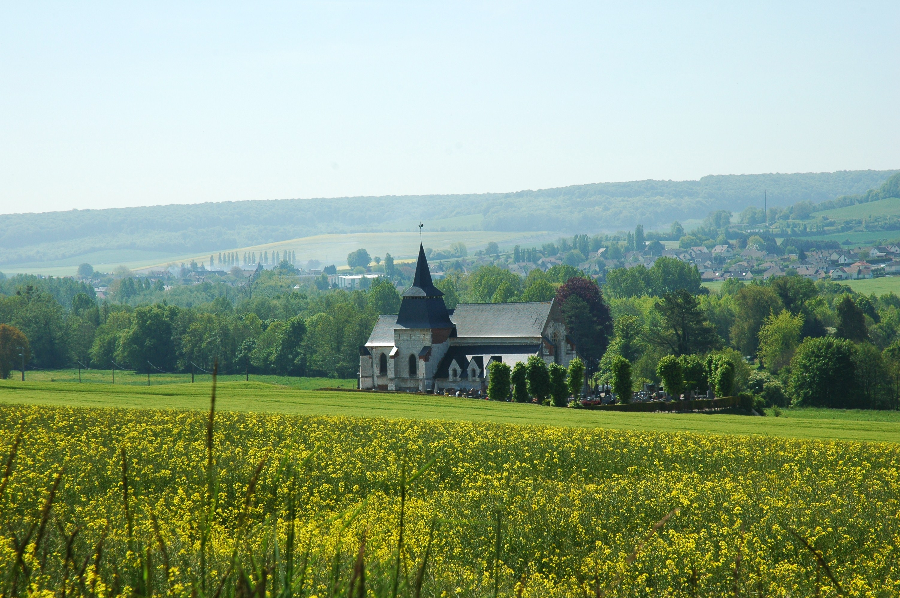 Bouttencourt (Somme, France). L'église Saint-Étienne.